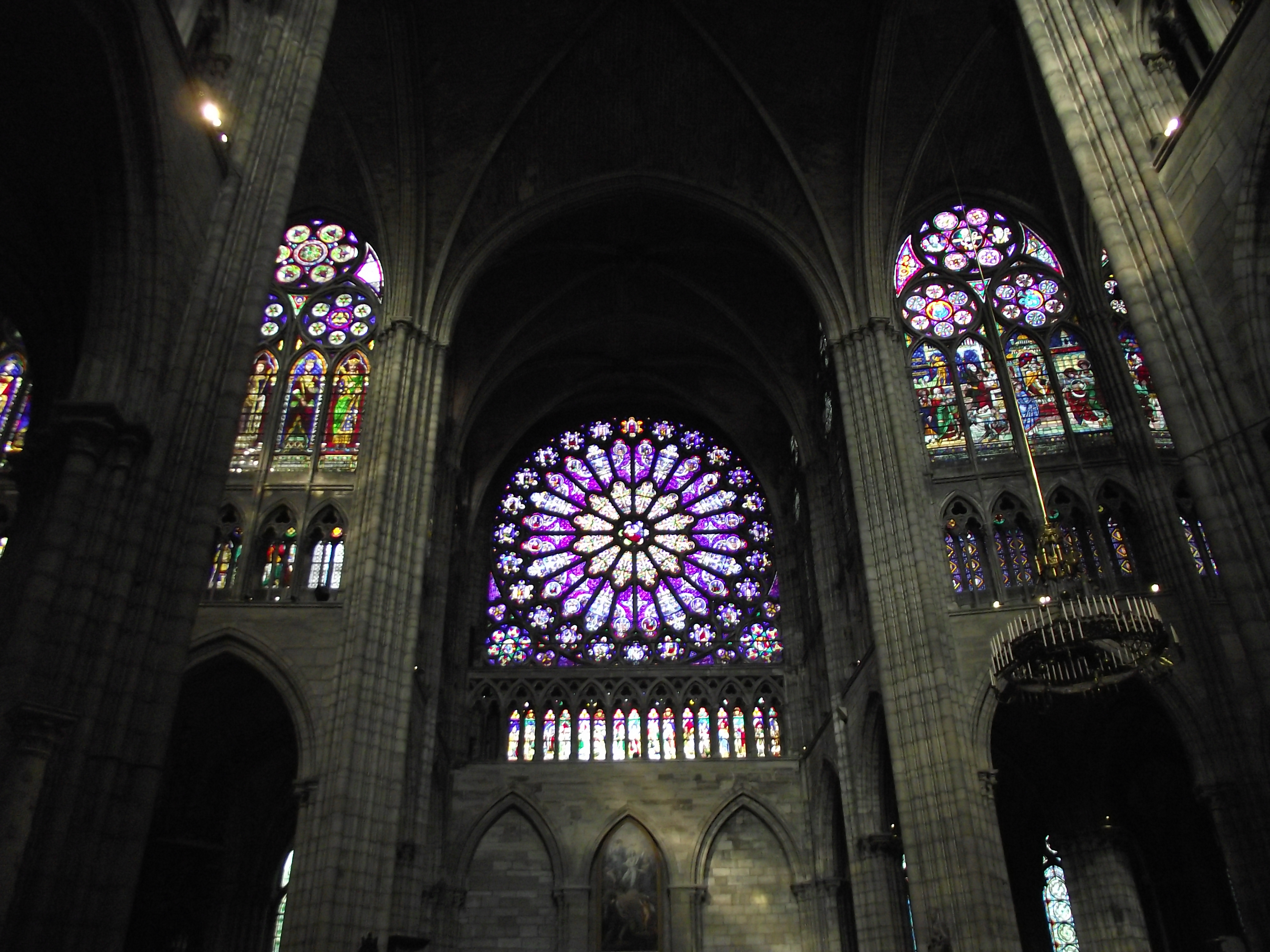 Basilique Sainte-Denis